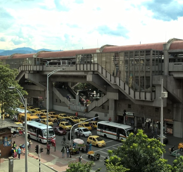 Estación Prado (Metro de Medellín)